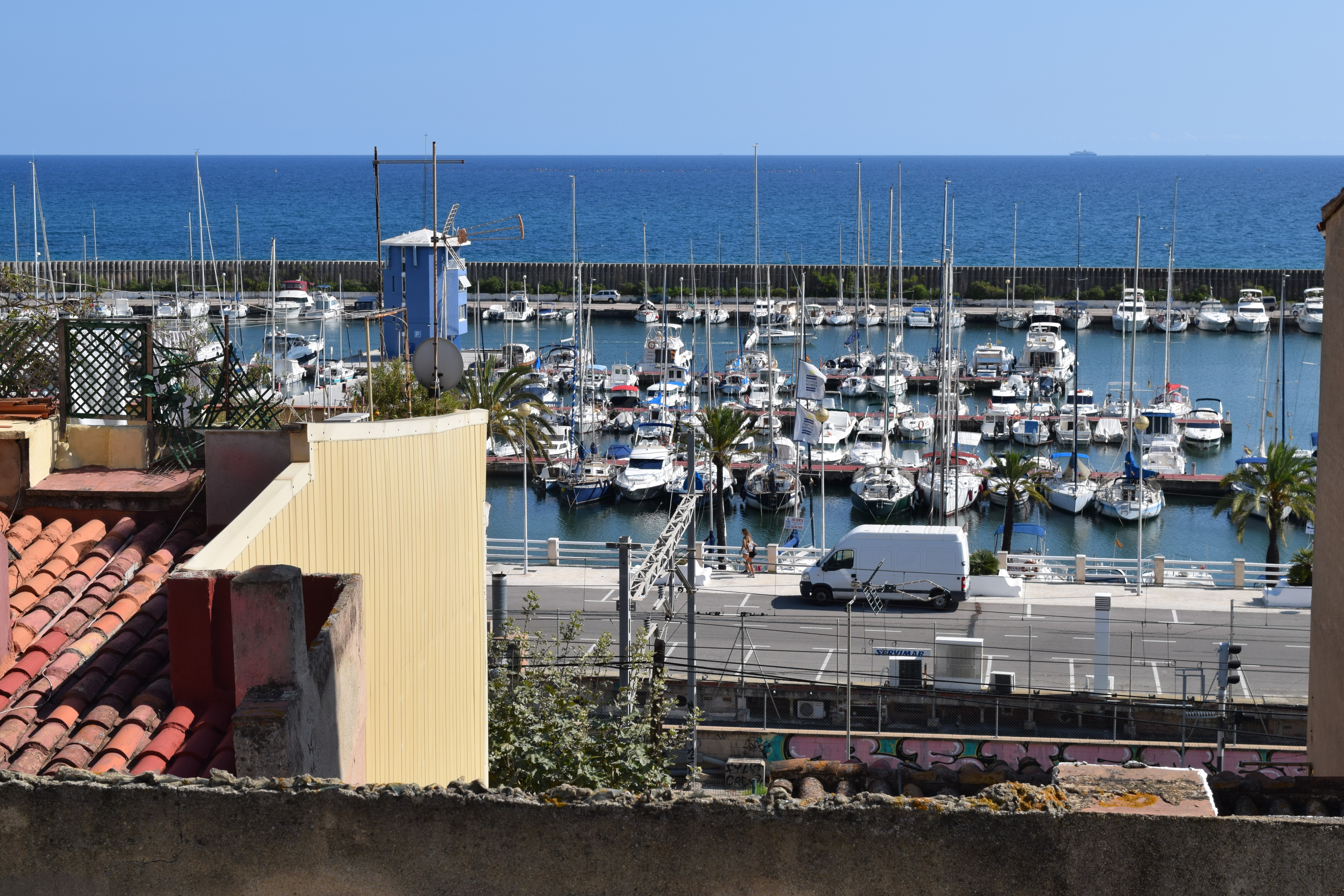 Vista del port del Masnou